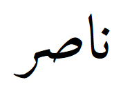 Насыр